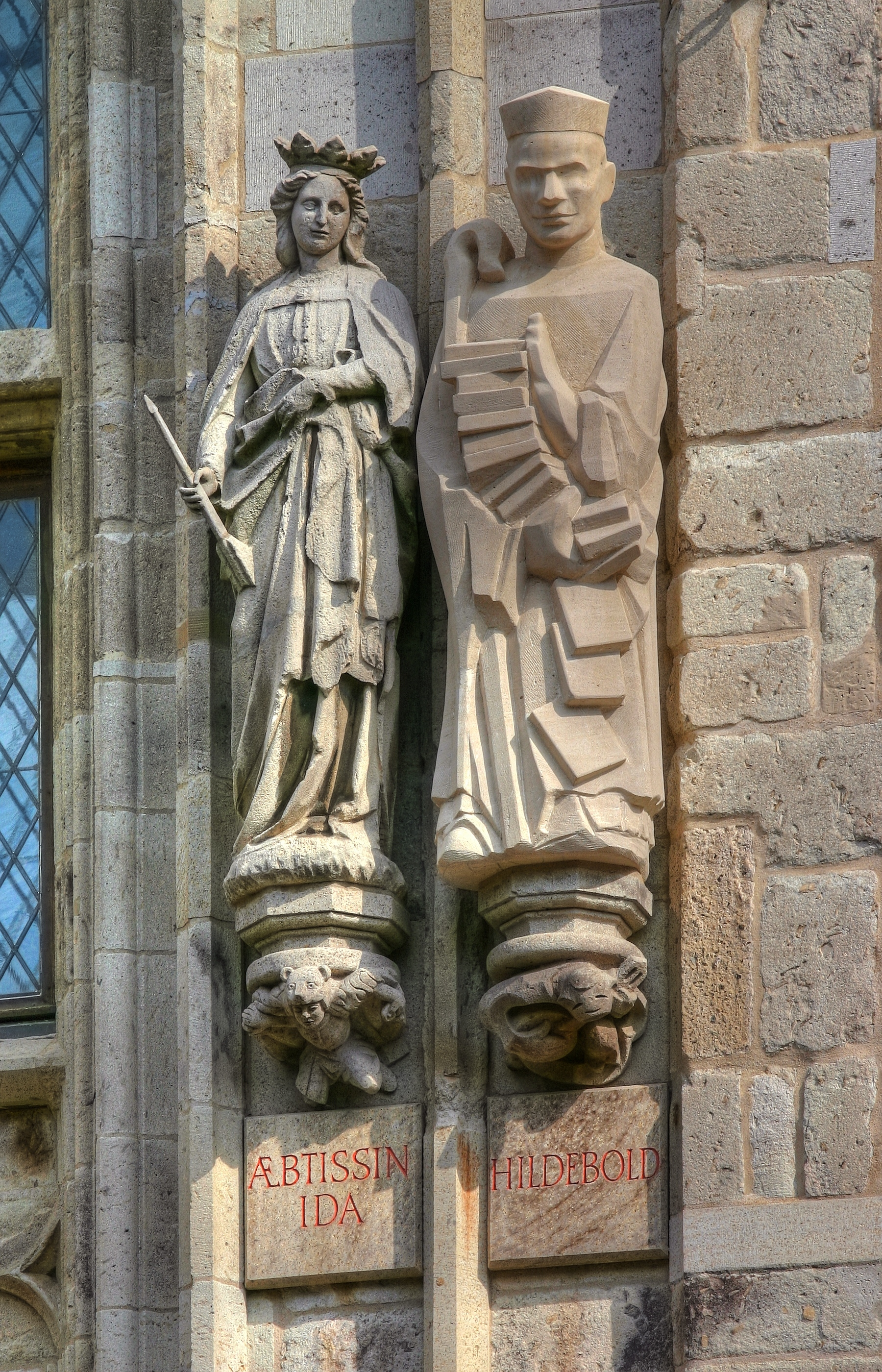 Rathausturm Köln mit den Figuren: Äbtissin Ida und Hildebold